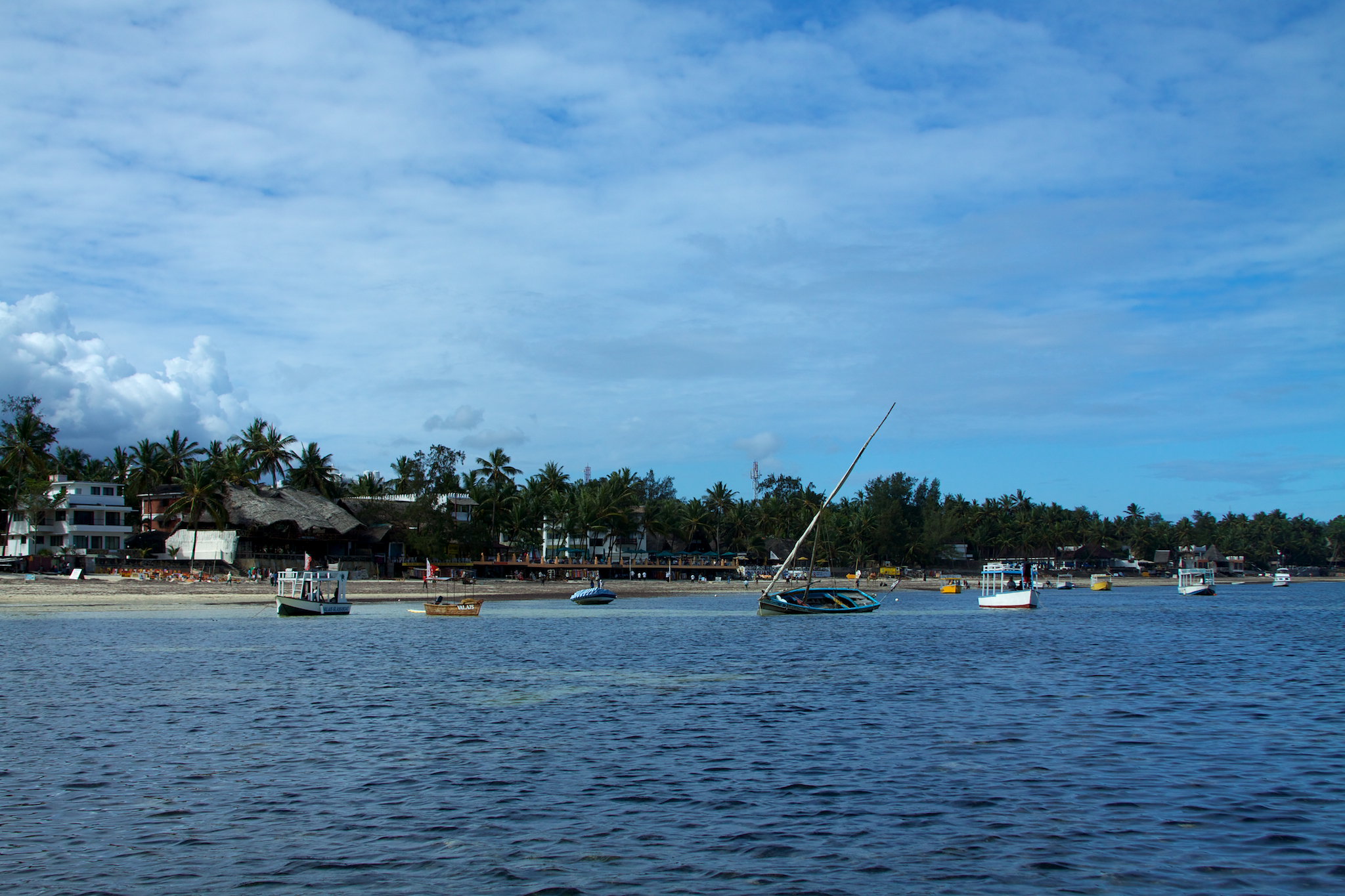 Mombasa beach